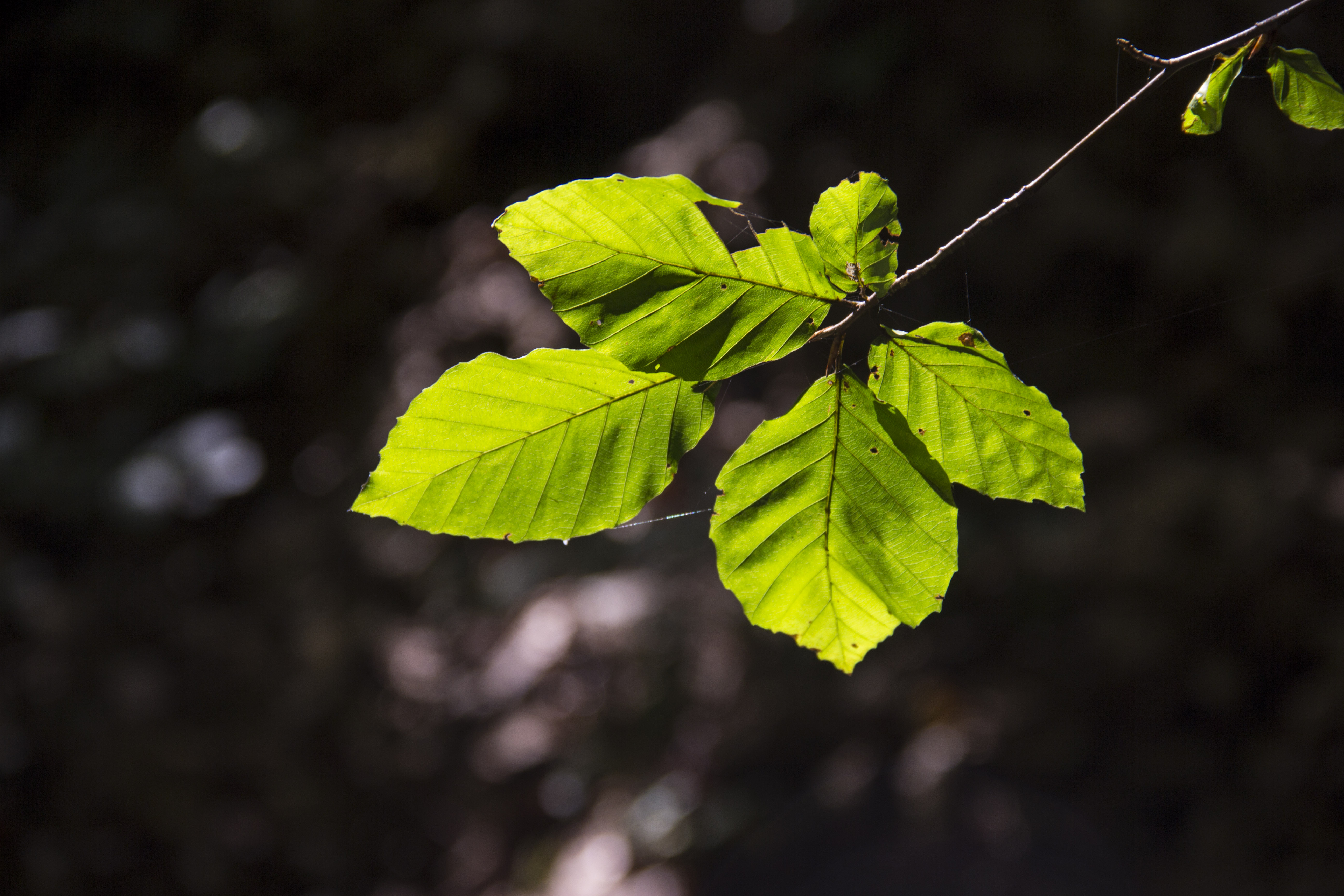 Kellerwald-Edersee, National Park